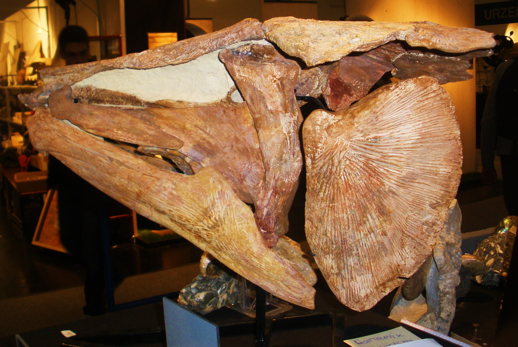 Fossil of Mawsonia, an extinct fish- Took the photo at Fossil Show, Munchen 2011